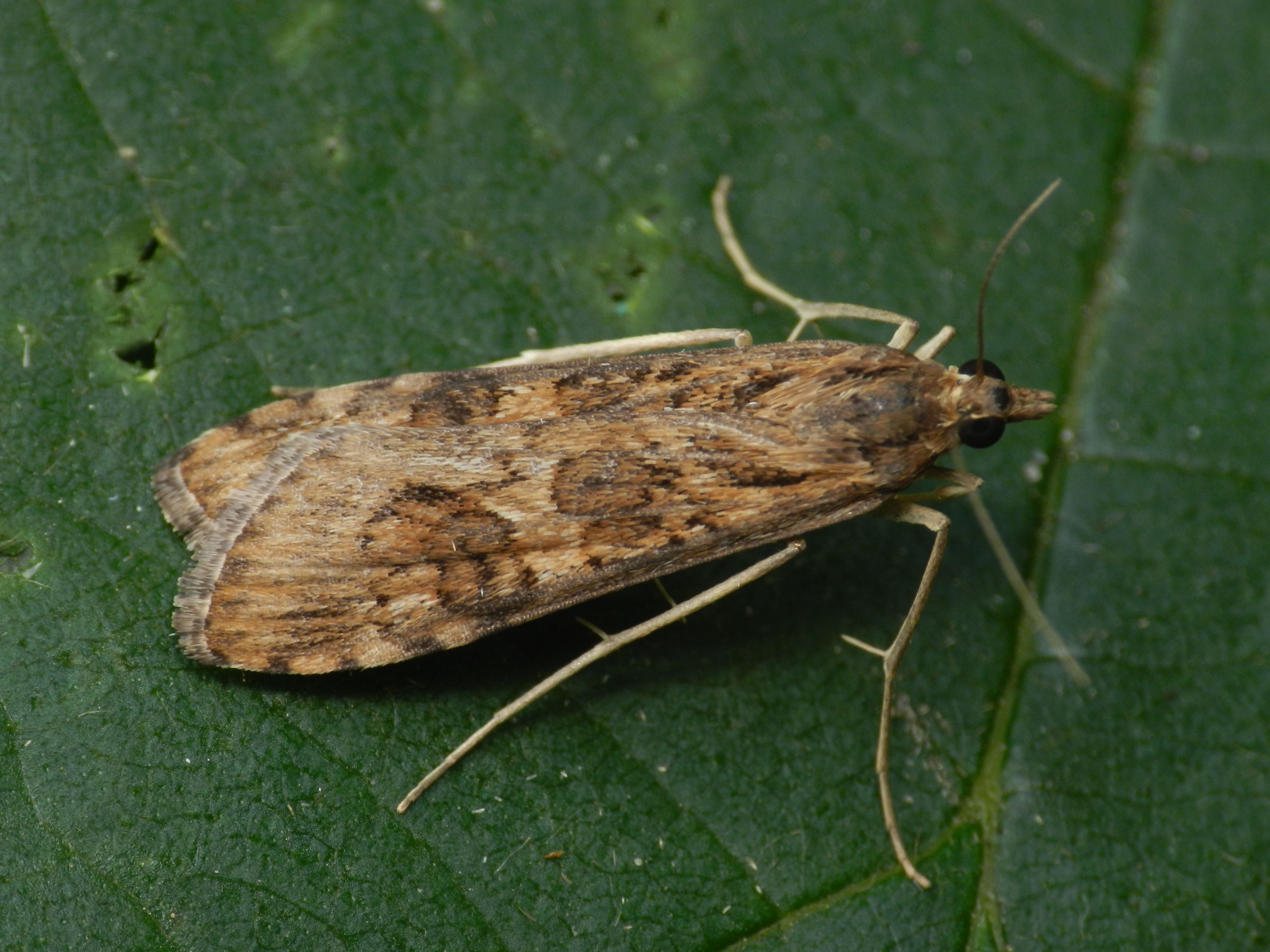 Nomophila noctuella. Picture taken in Olsztyn, Poland.